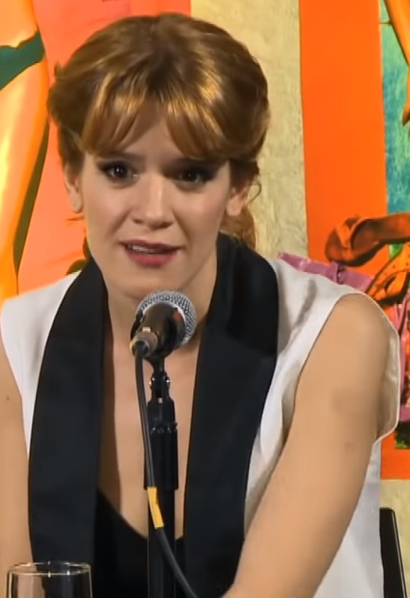 Violeta Urtizberea en 2014